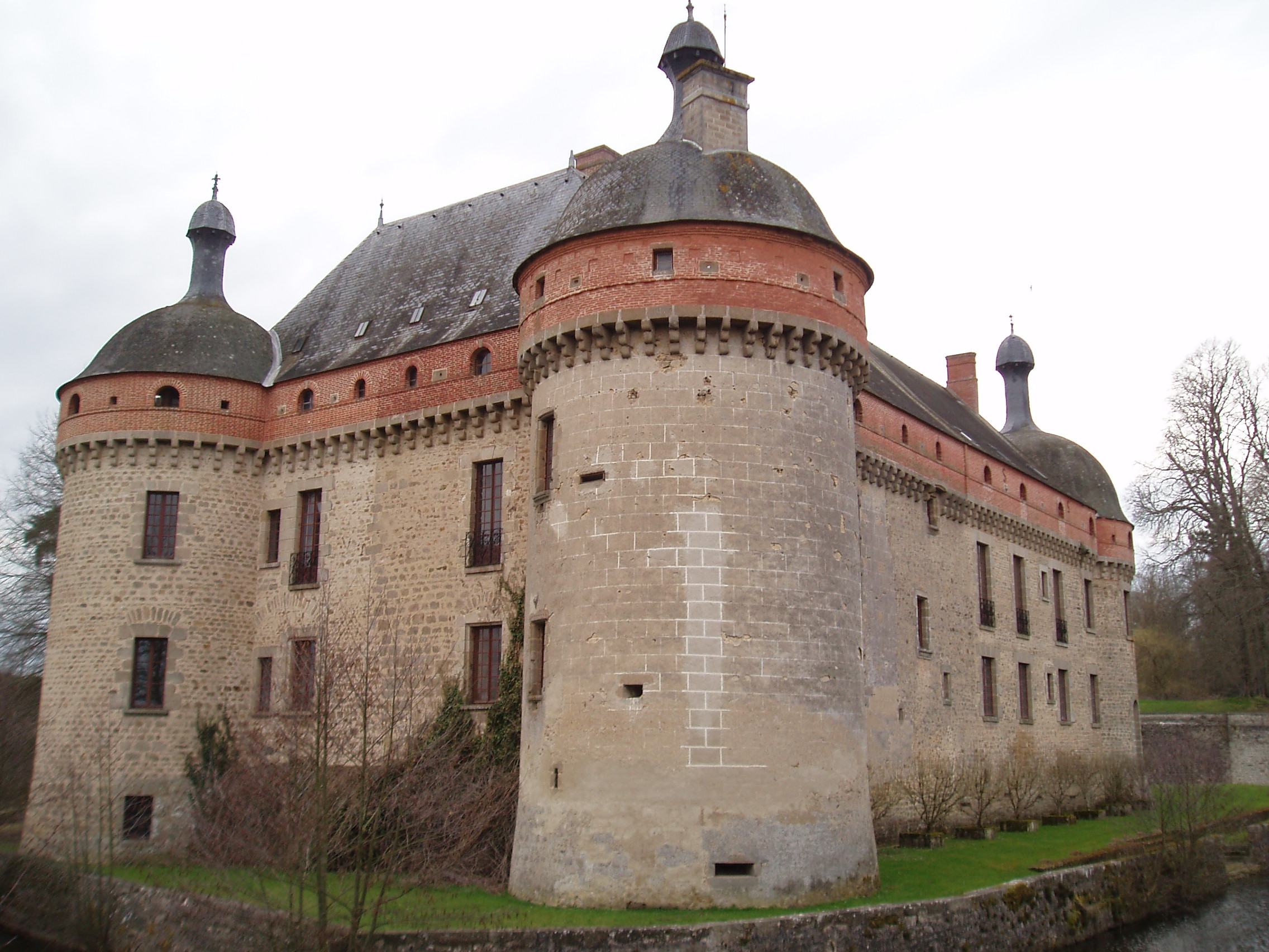 Château